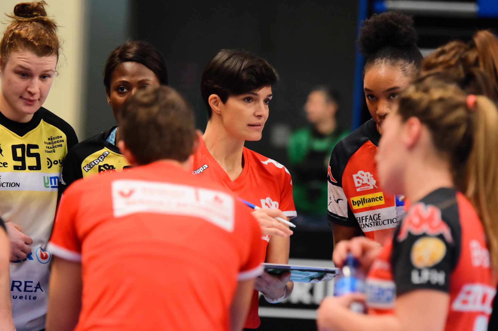 Rencontre Issy Paris Hand / ES Besançon. A Coubertin, le 10 janvier 2018.